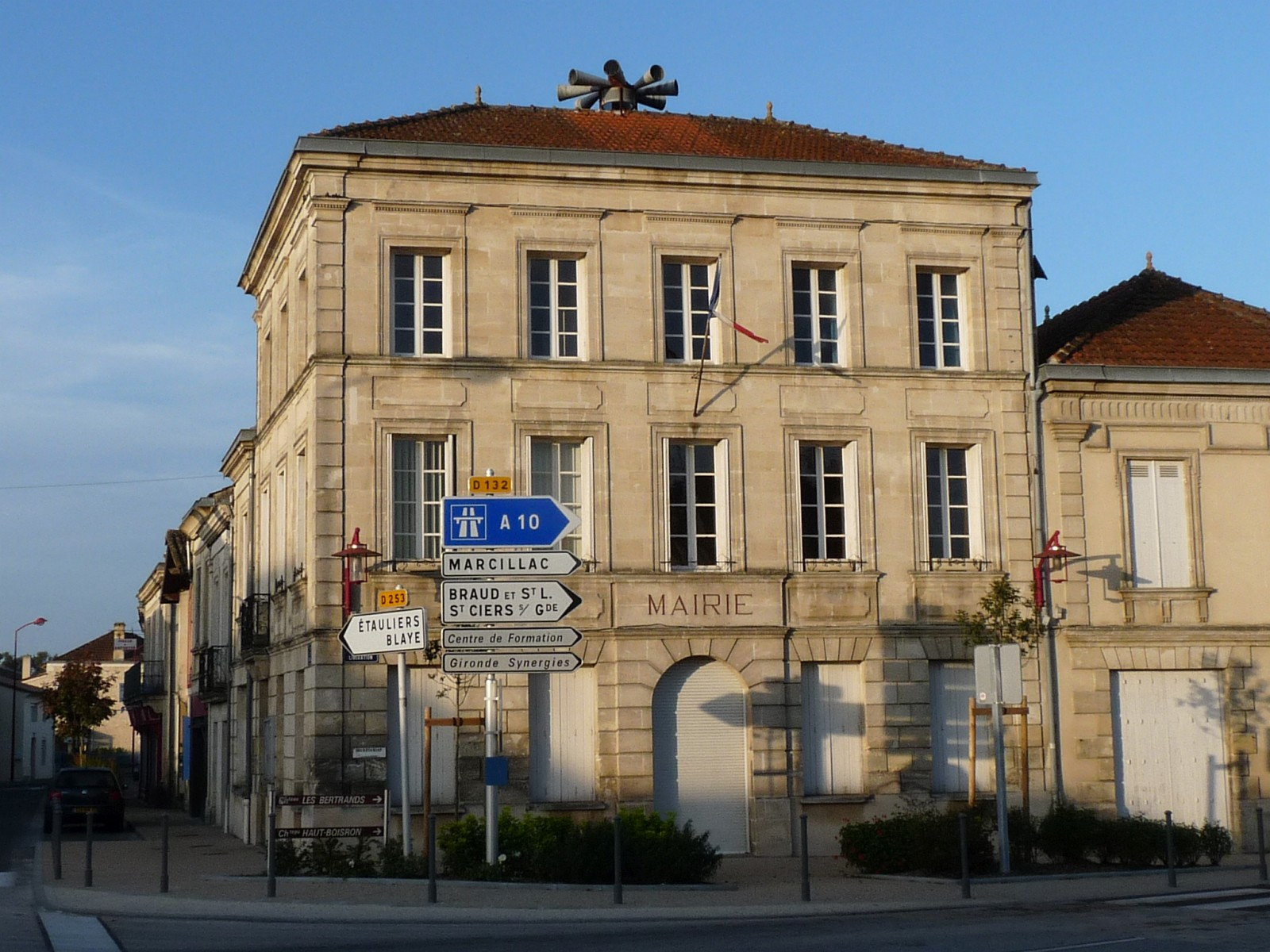 Mairie de Reignac, Gironde, France